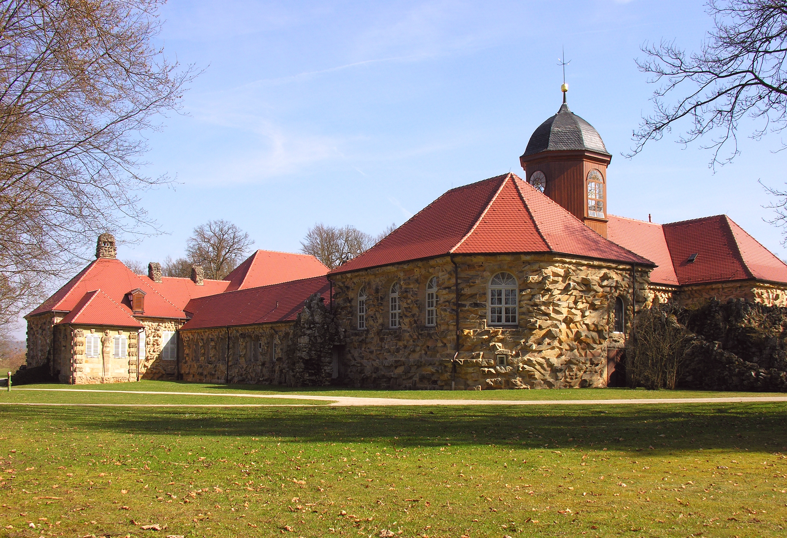 Eremitage von Bayreuth: das alte Schloss 1719-22 aus der Südwest-Perspektive - Foto Wolfgang Pehlemann DSCN7085